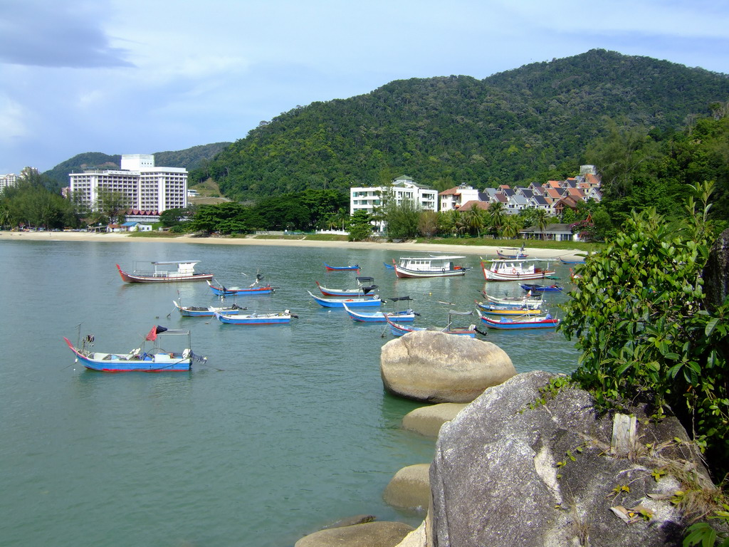 Penang - Malesia Panorama della spiaggia di Batu Ferringhi